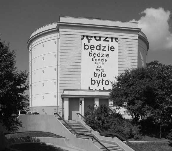 Muzeum Współczesne Wrocław fot. Patrycja Mastej